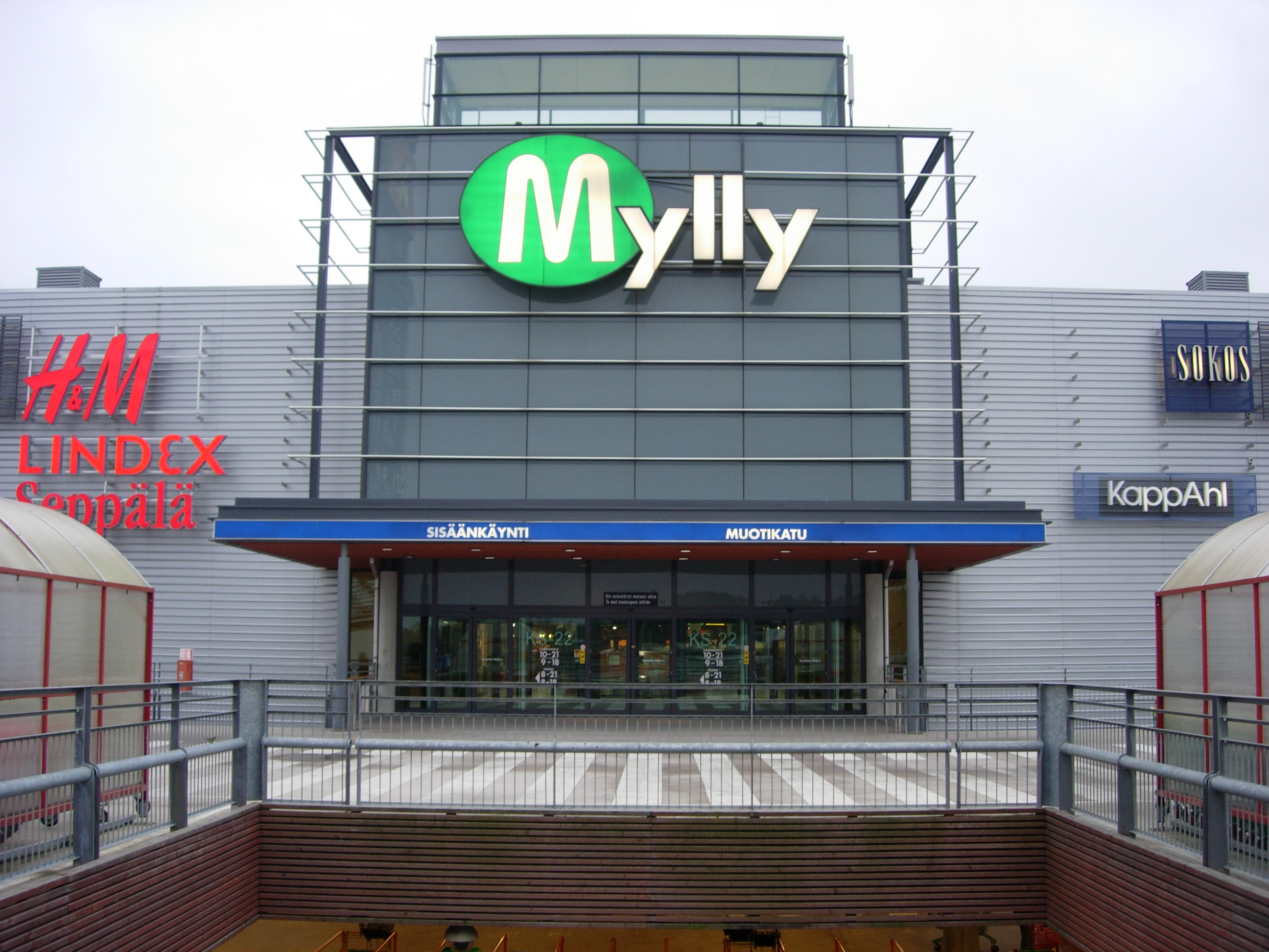 Kauppakeskus Myllyn toisen kerroksen sisäänkäynti autoparkista.